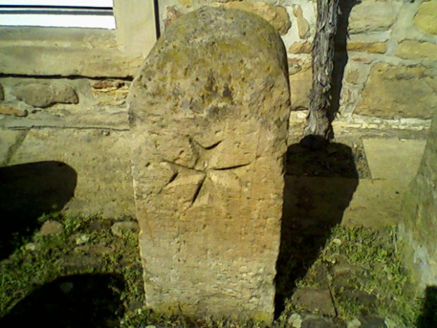 Fotographie des Grenzsteins der Komturei Heimbach